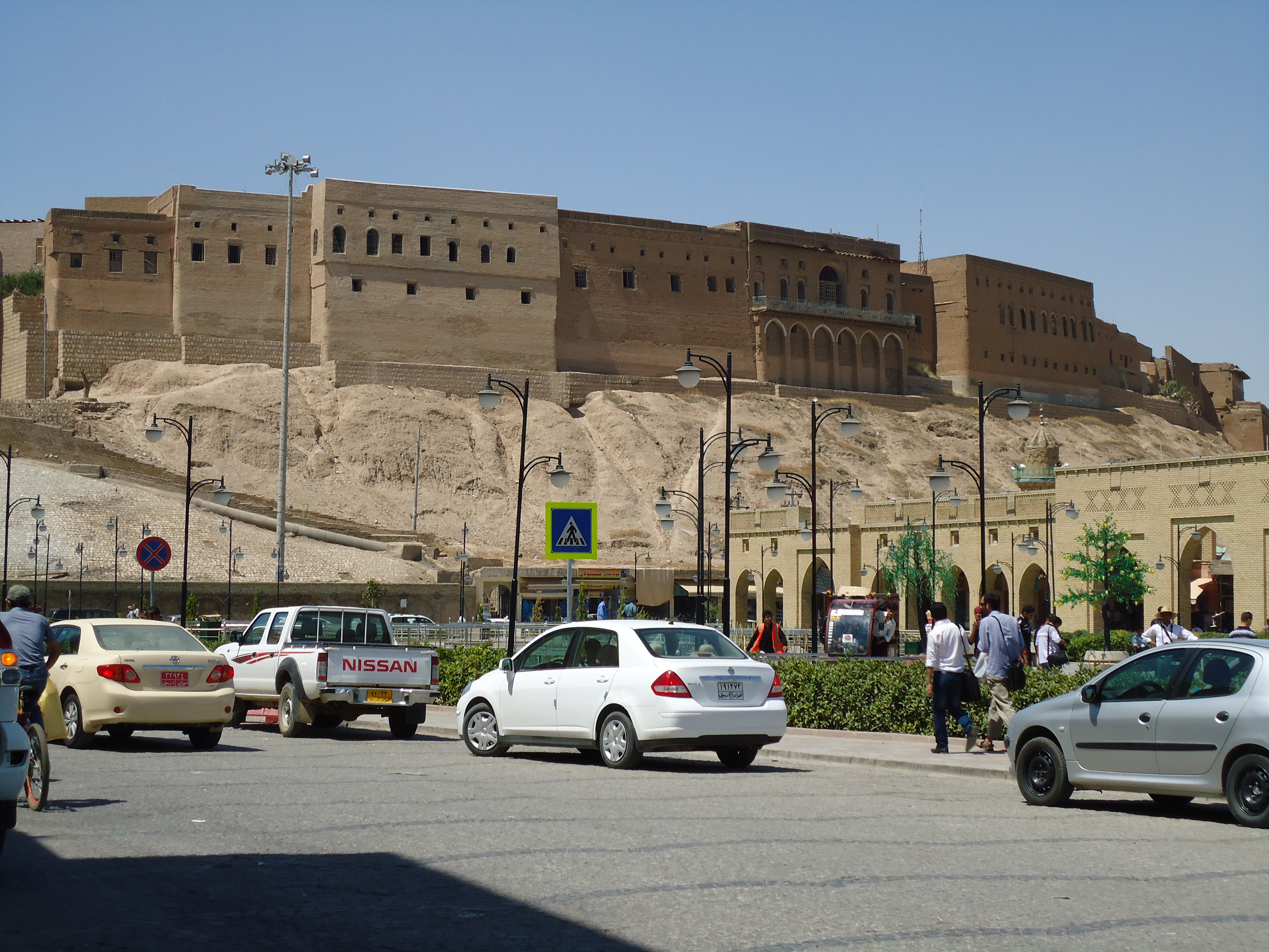 کوردیی ناوەندی: بەردەم قەڵای ھەولێر